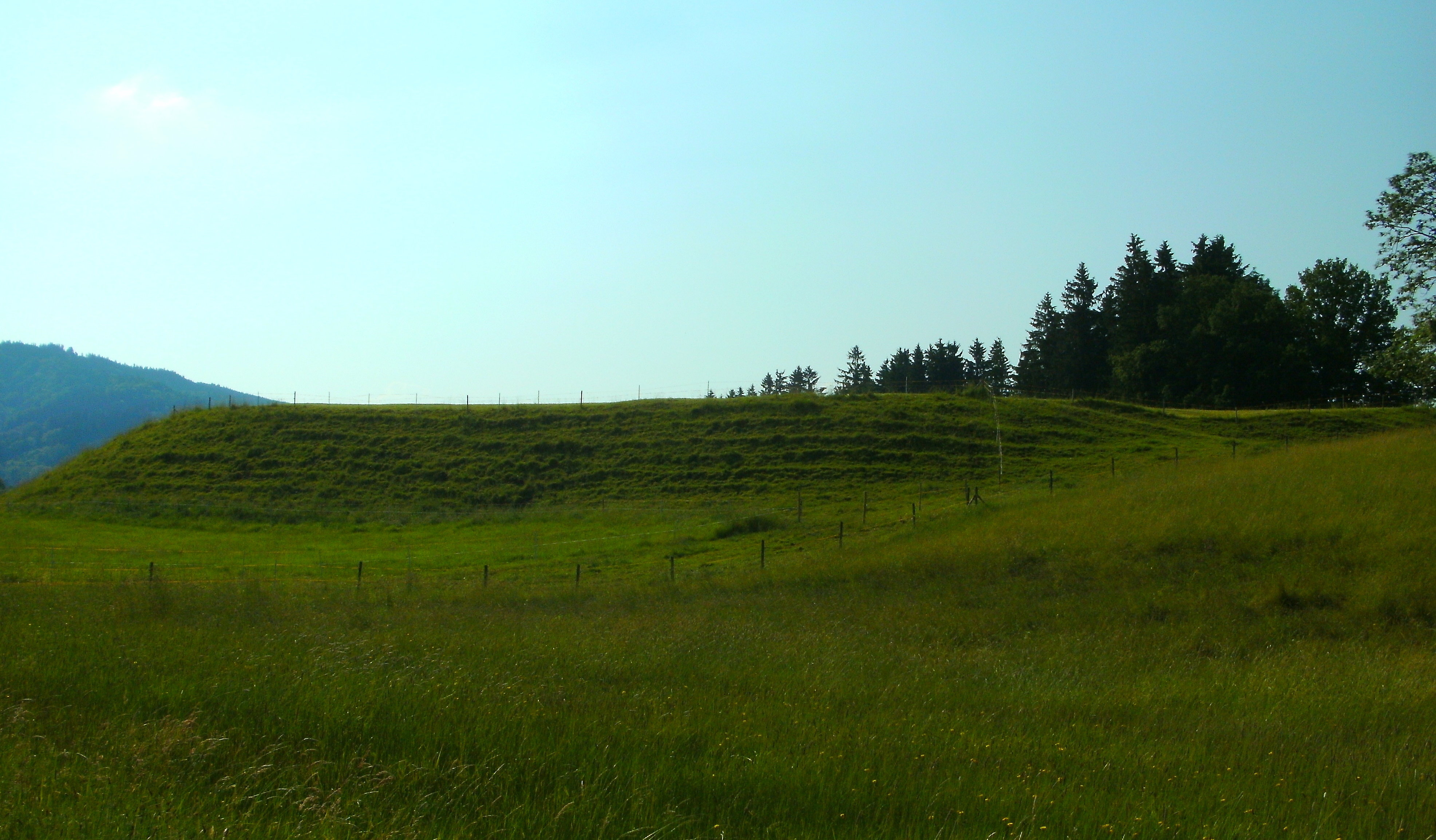 Römer Kastell Vemania Bettmauer Teilort von Isny im Allgäu - Die Bettmauer